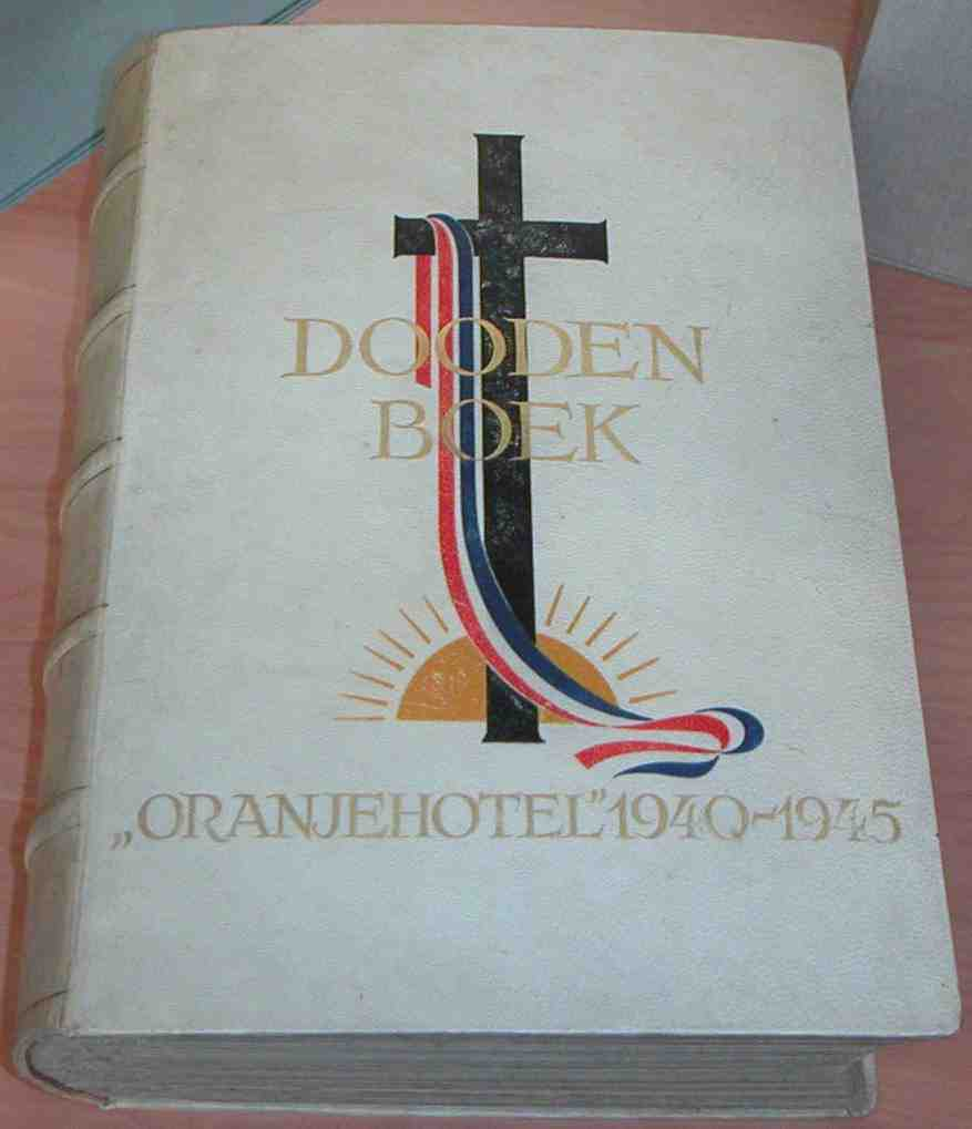 Doodenboek van het Oranjehotel (eigen foto)